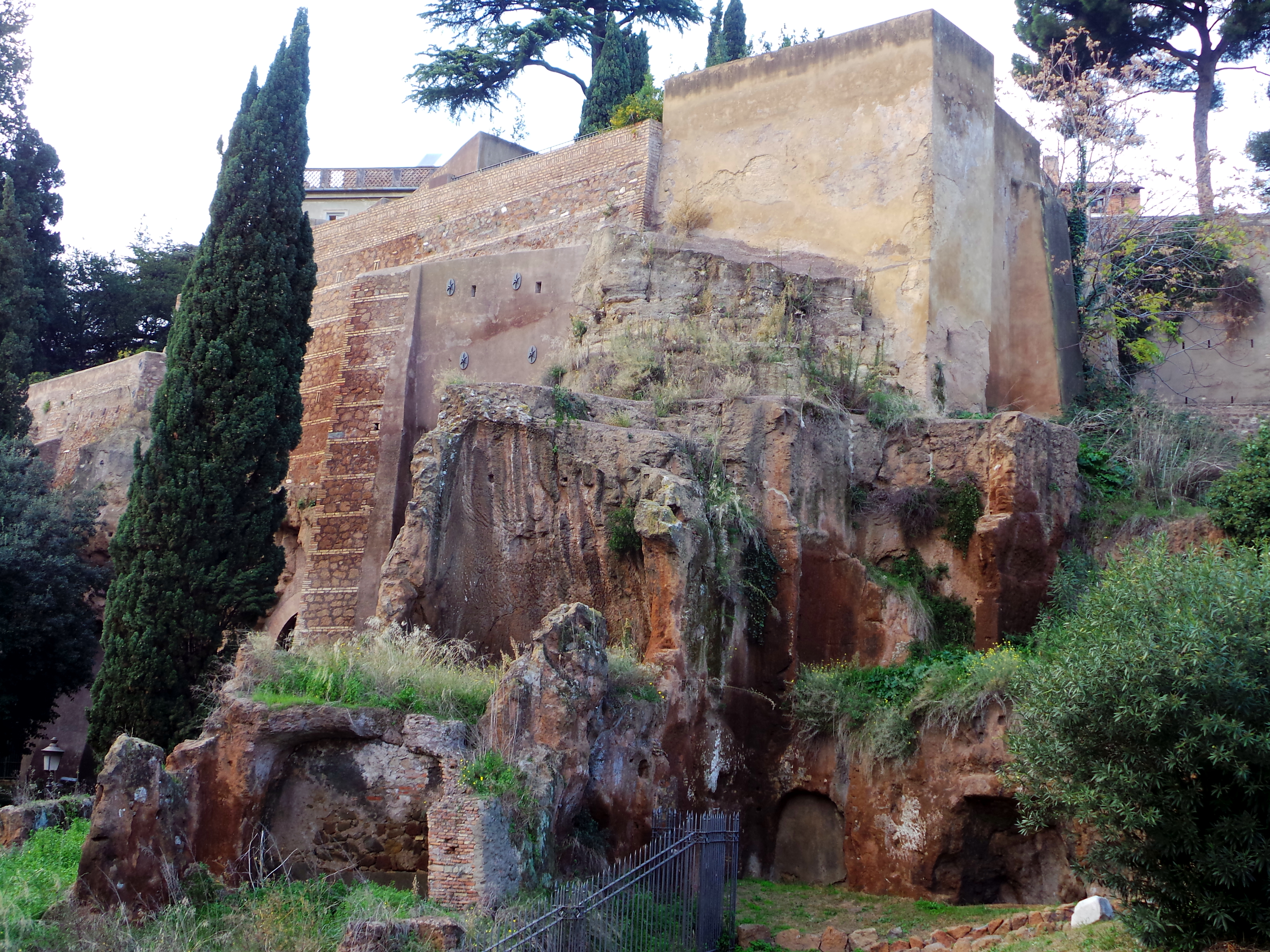 Tarpejischer Fels 2015